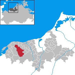 Kröpelin in Mecklenburg-Western Pomerania - District Bad Doberan